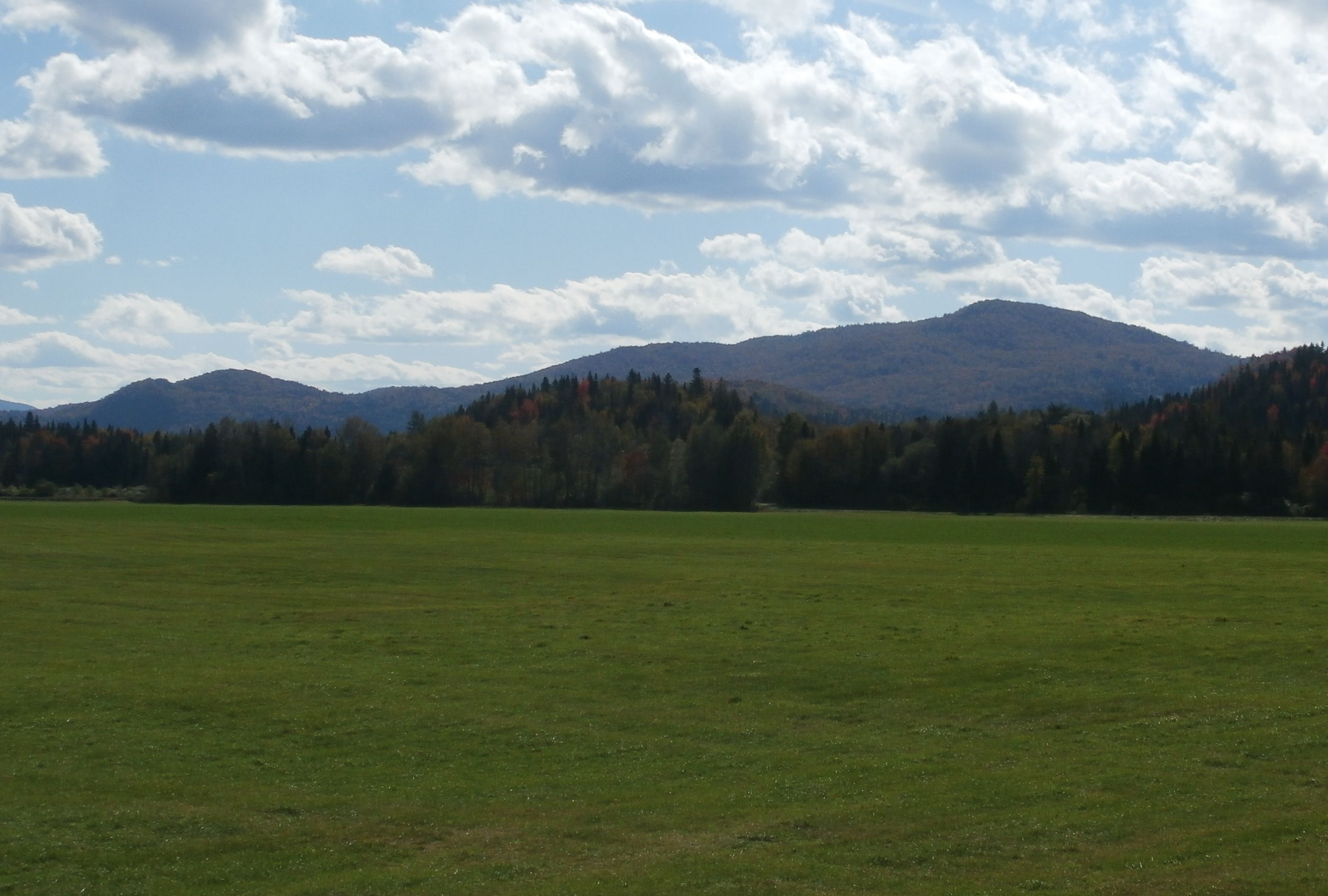 Mont Hereford.